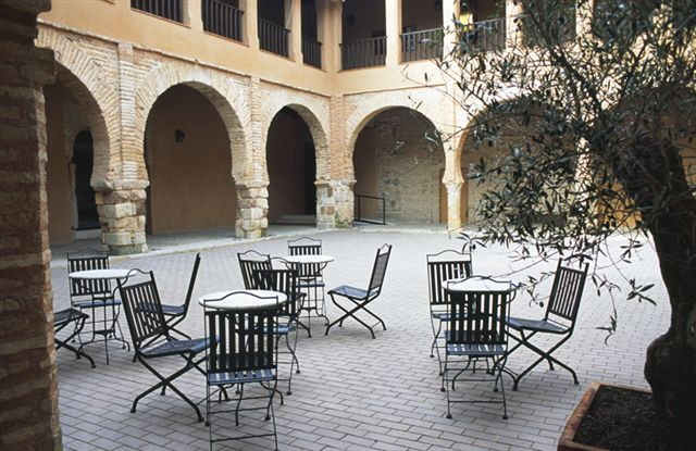 Detalle del claustro del Museo Nacional del Teatro (España)